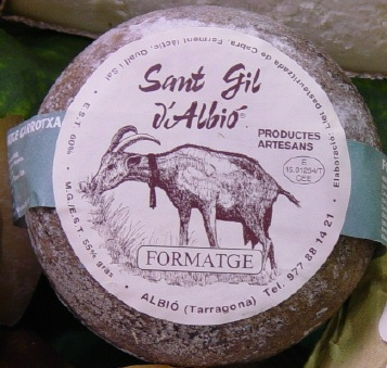 Formatge d'Albió, propi d'aquest indret de la Vall del Corb.